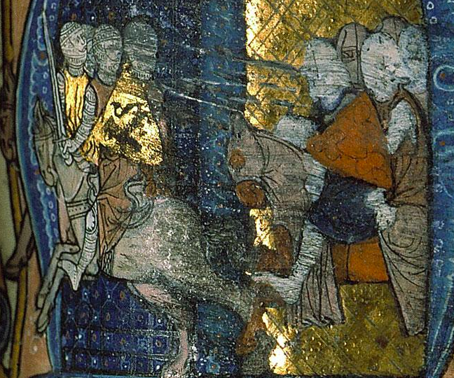 Fuite des Normands devant l'armée de Richard, duc de Bourgogne